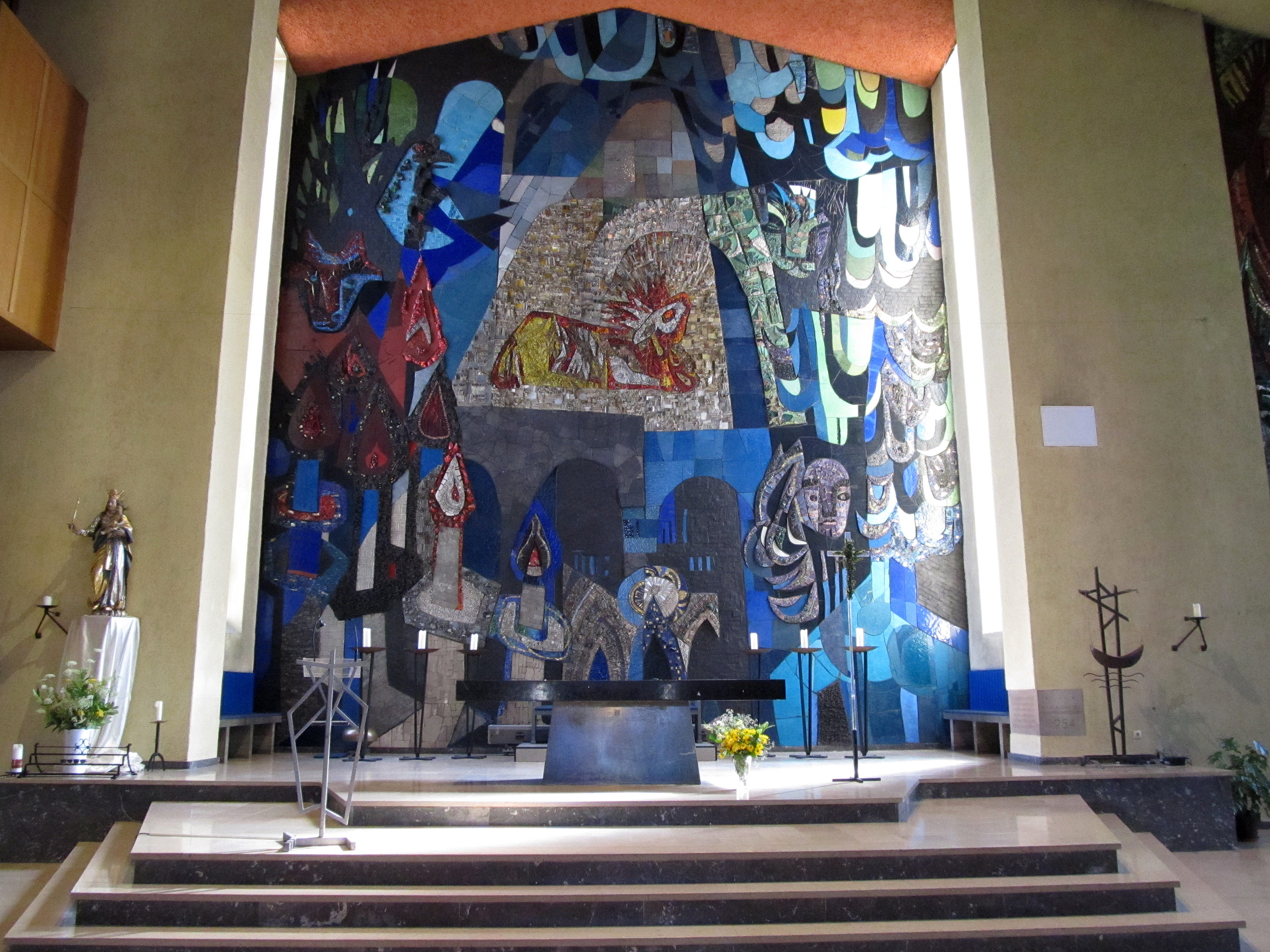 Altarmosaik in der katholischen Pfarrkirche Maria vom Frieden in Homburg-Erbach, Saarland